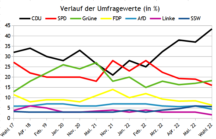 Schleswig-Holstein-Wahl 2022 Umfragen